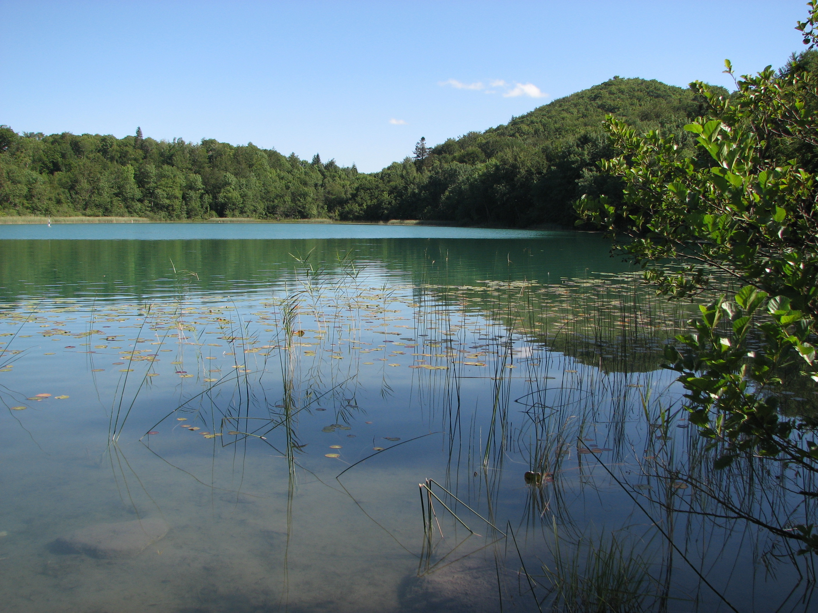 Lac d'Ambléon (Ain)